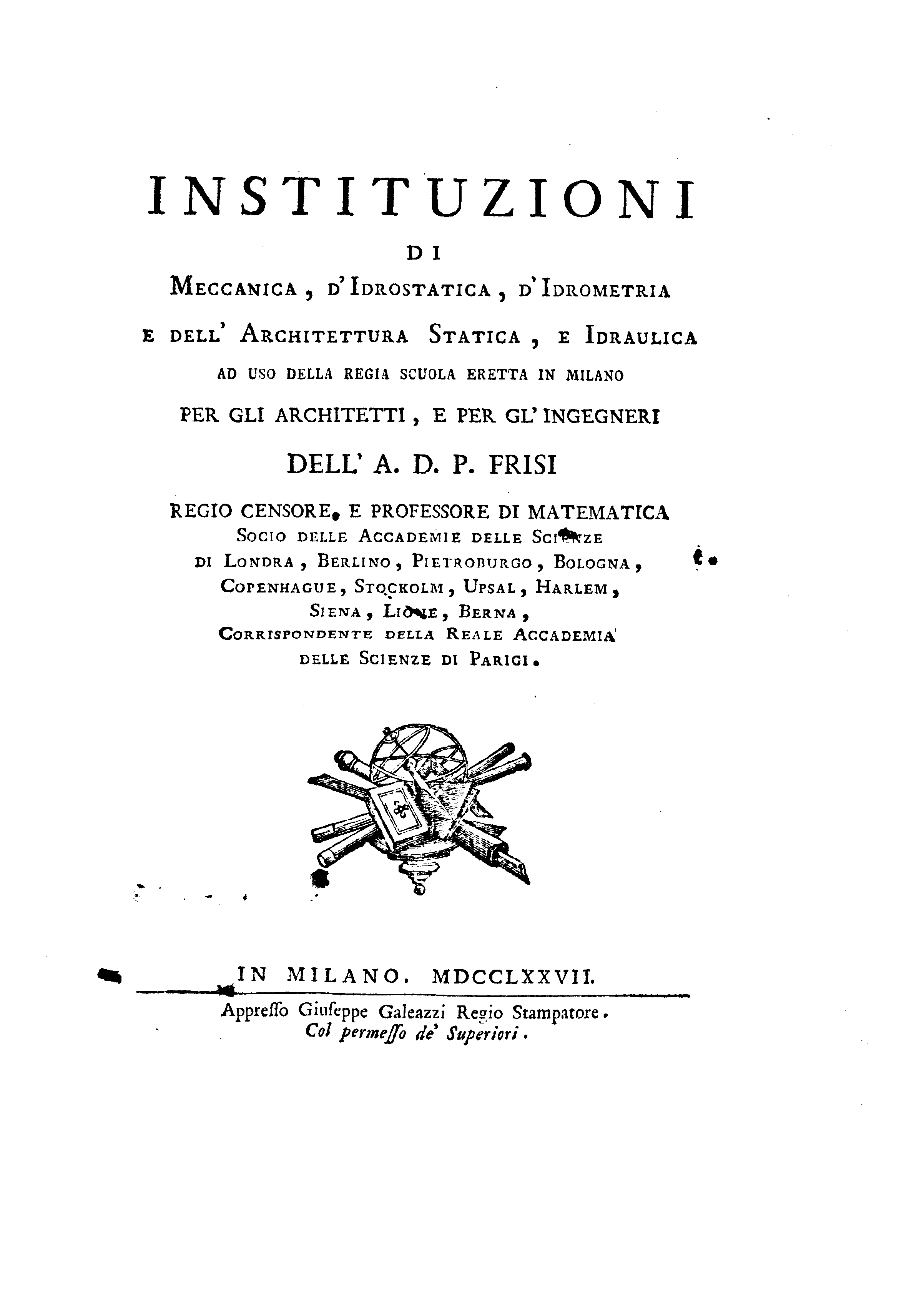 Instituzioni di meccanica, d'idrostatica, d'idrometria e dell' architettura statica, e idraulica ... dell'A. D. P. Frisi .... - In Milano : appresso Giuseppe Galeazzi Regio Stampatore, 1777. - [8], 447, [1] p., [7] c. di tav. : ill. ; 4º . Frontespizio